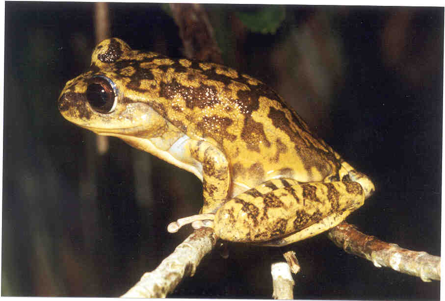 Bokermannohyla saxicola